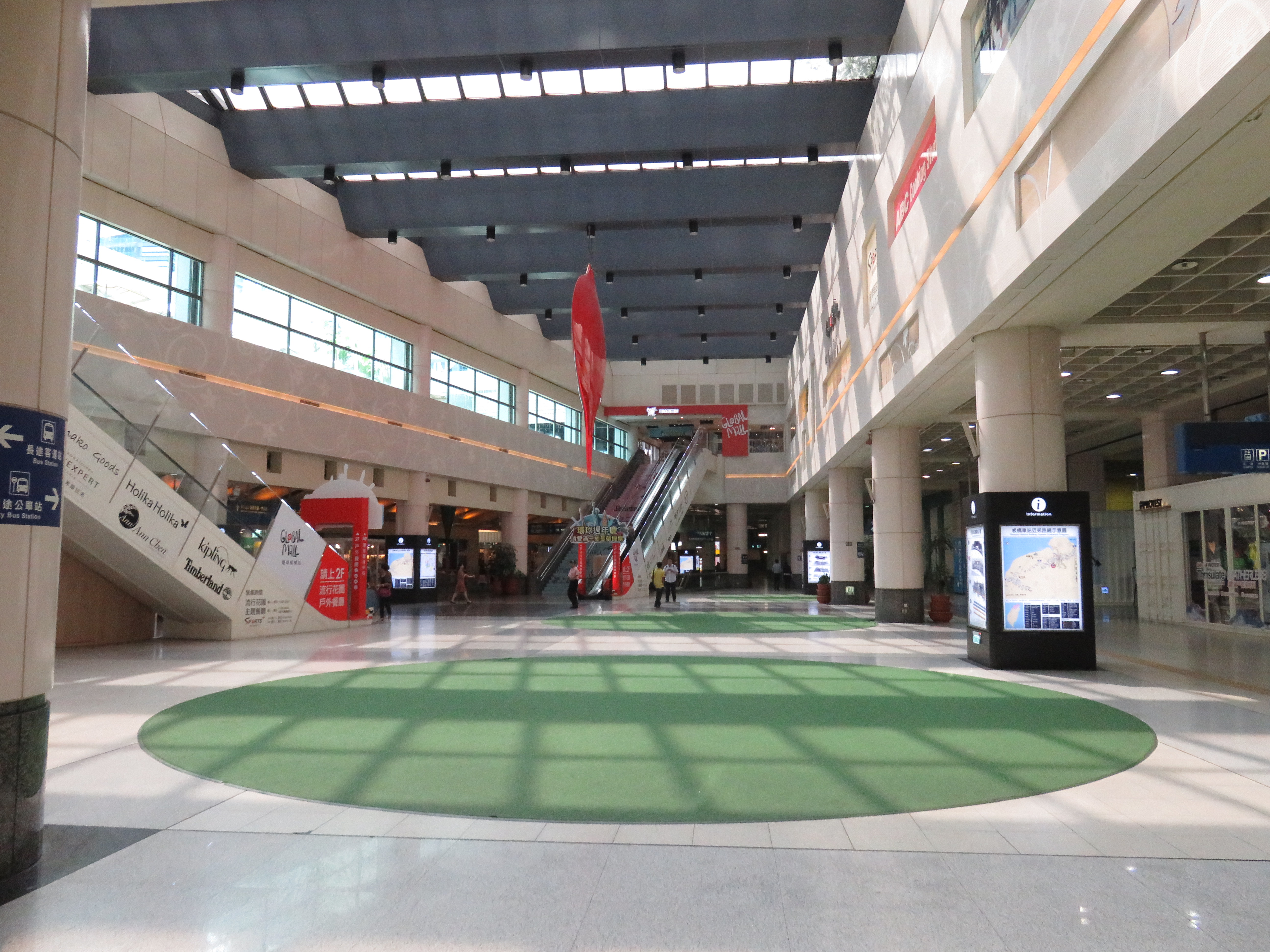 板橋車站一樓大廳